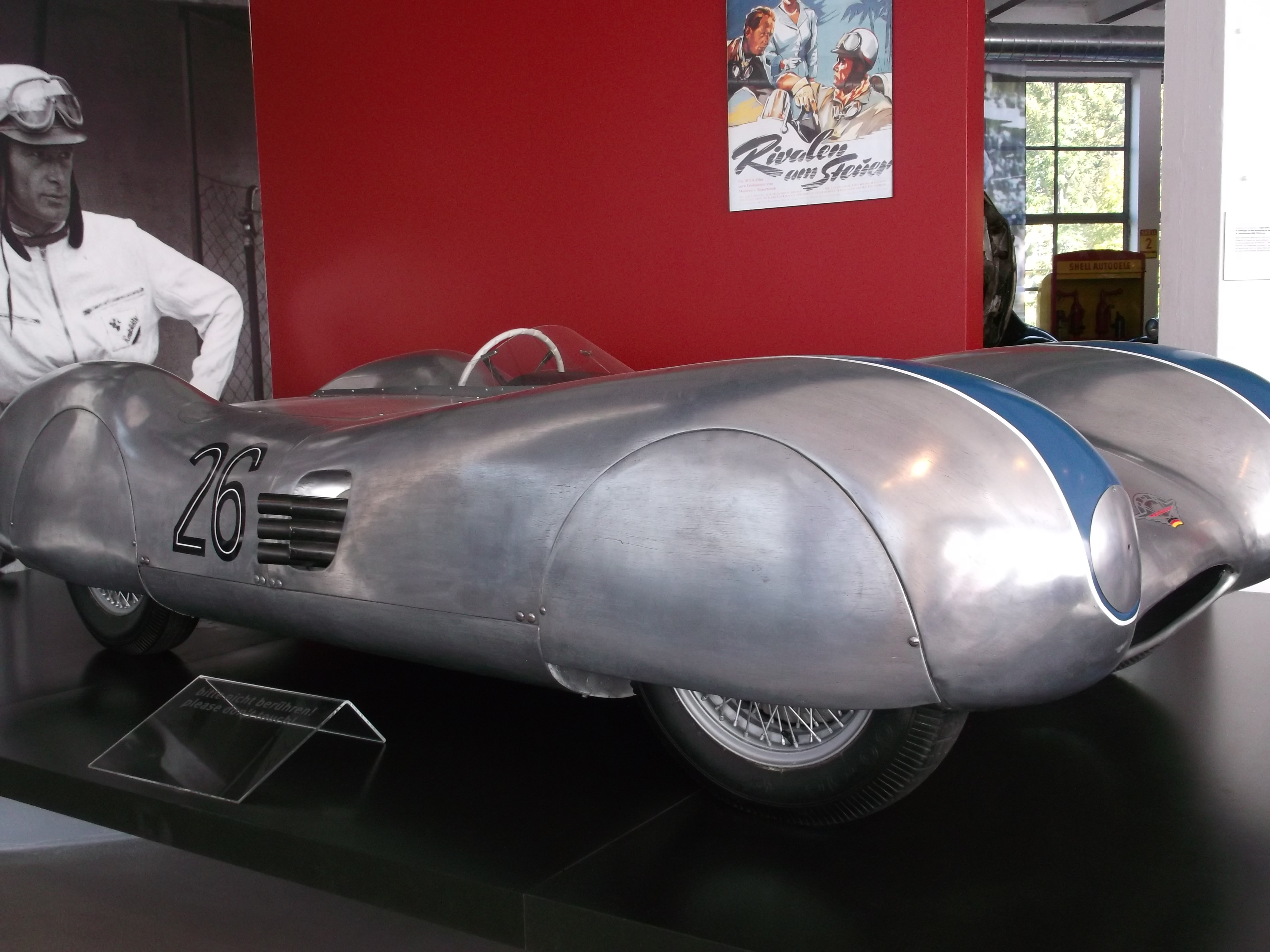 AWE Rennsportwagen R3/55 im Museum automobile Welt Eisenach